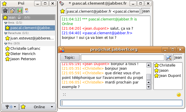 Copie d'écran de Psi